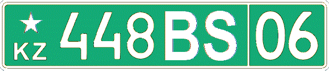 Военный автомобильный номер Казахстана (пограничная служба) с 2015 года